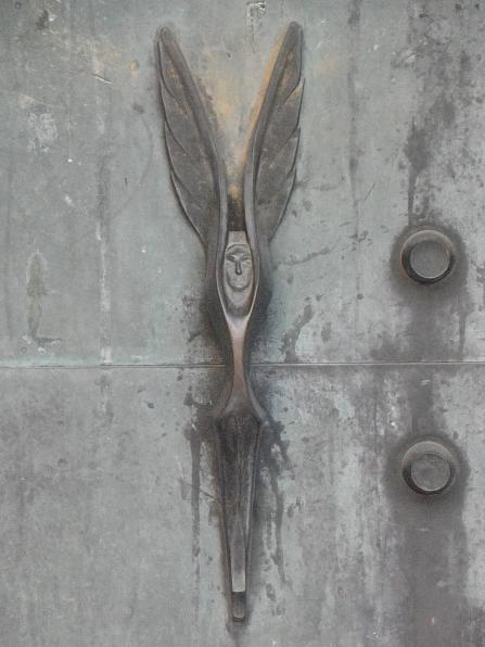 Poignée de la porte principale de l'église N.D. de l'Annonciation de Lyon (69)